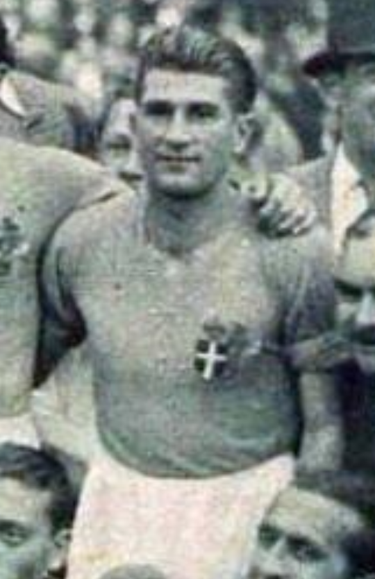 Gino Colaussi celebrando la obtención de la Copa del Mundo de 1938